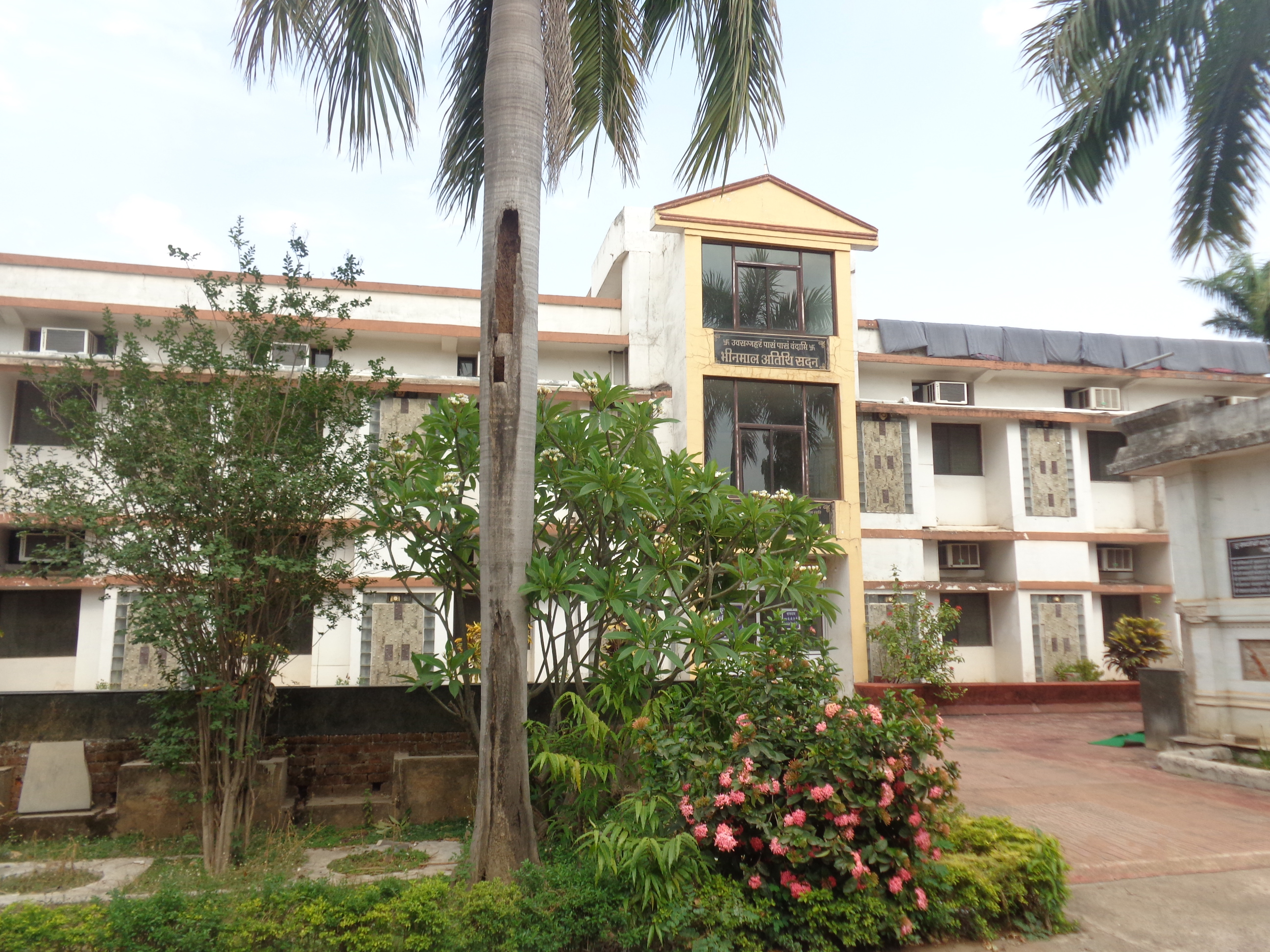 uwasaggaharam building, nagpura, durg, chattisgarh